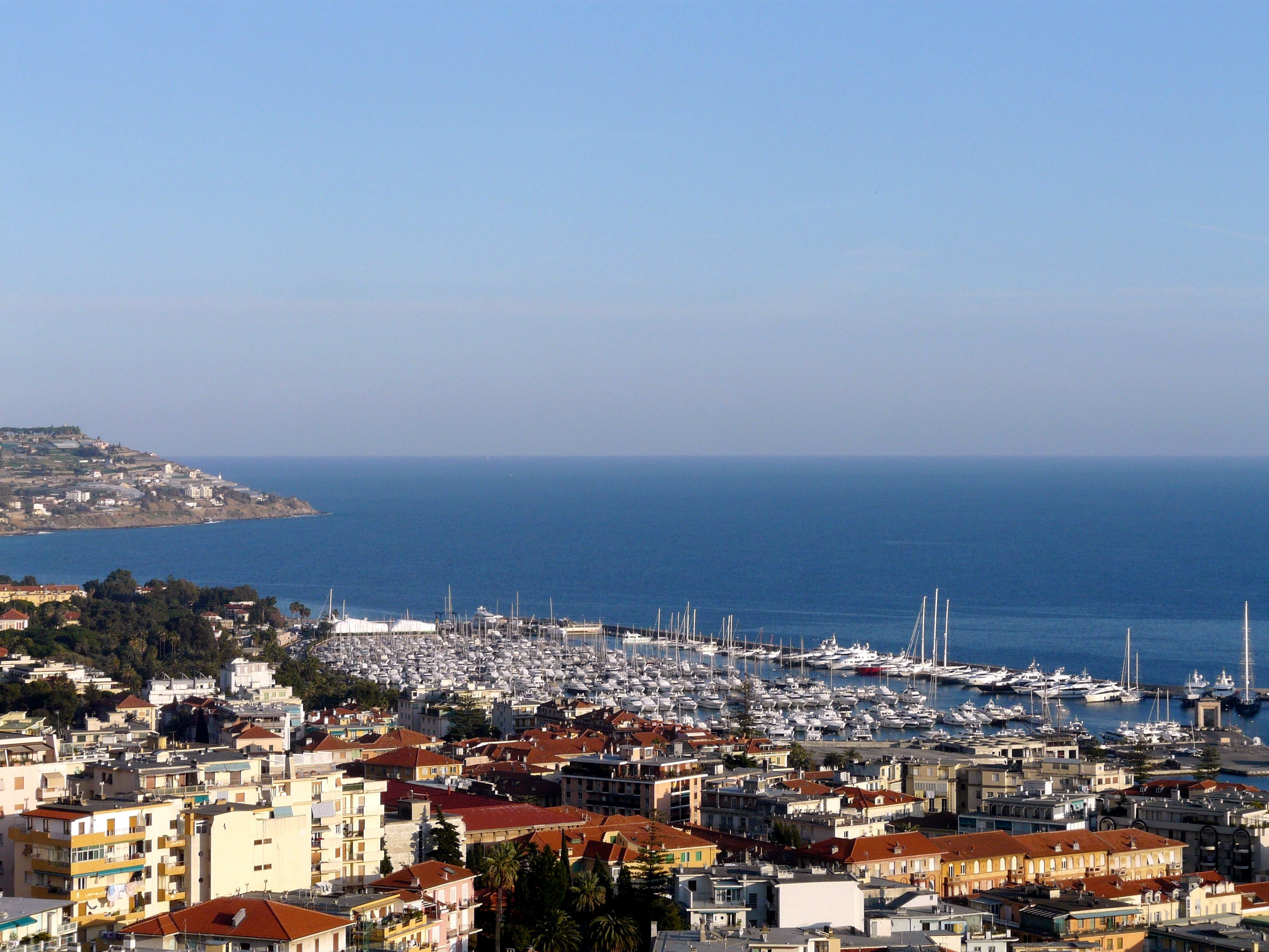 Panorama della città e del porto dal santuario della Madonna della Costa, Sanremo, Liguria, Italia